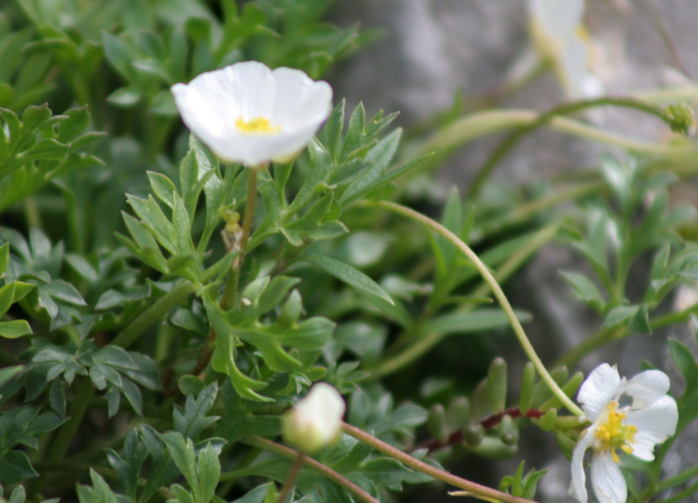 Ranuncolo di Seguier - Località: "Giardino Botanico delle Alpi Orientali", Monte Faverghera (BL), 1500 m s.l.m.